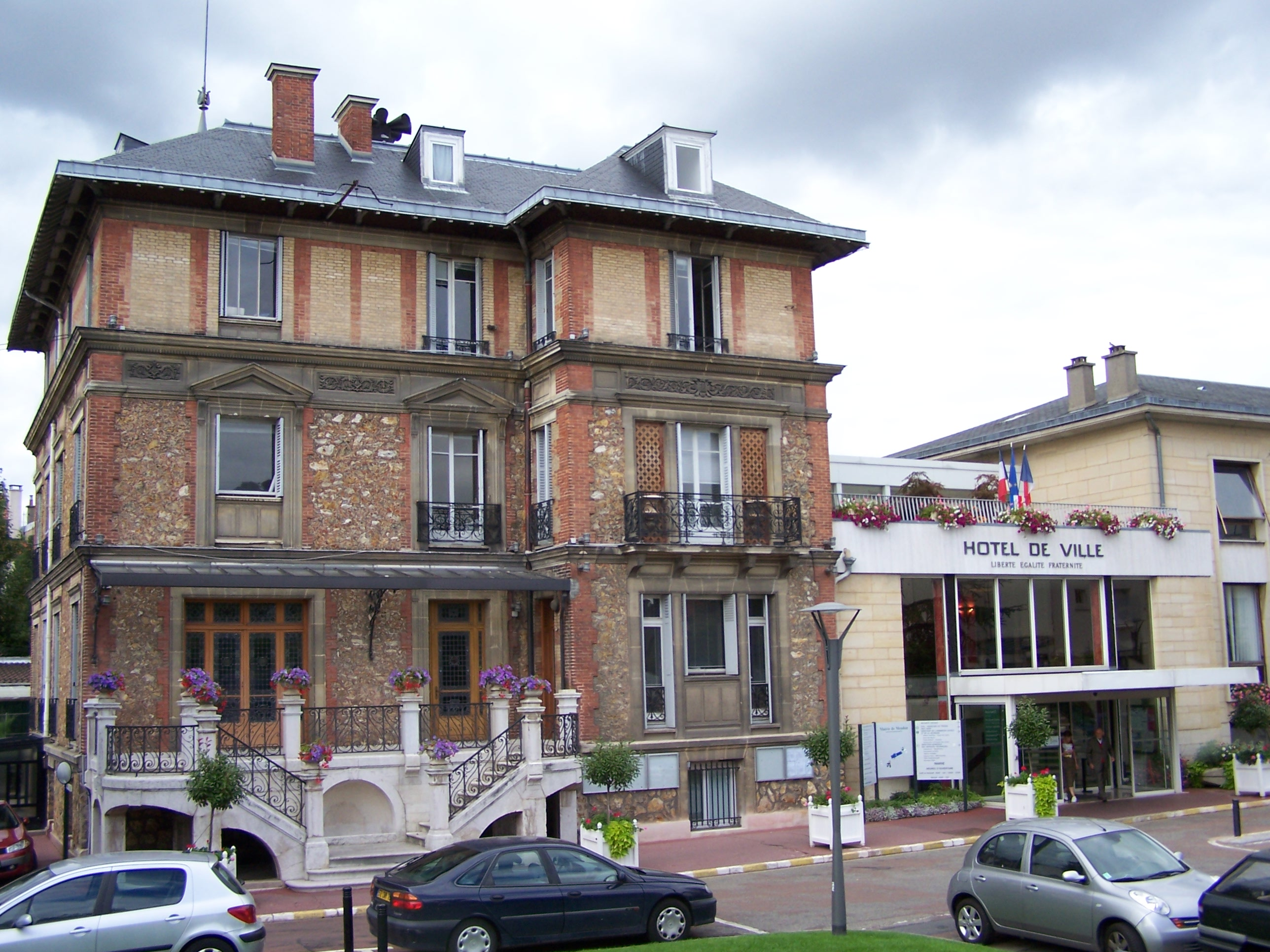 Mairie de Meudon (Hauts-de-Seine, France). Photo personnelle. Town hall of Meudon (Hauts-de-Seine, France). Personal photo. Auteur/Author : Henry Salomé